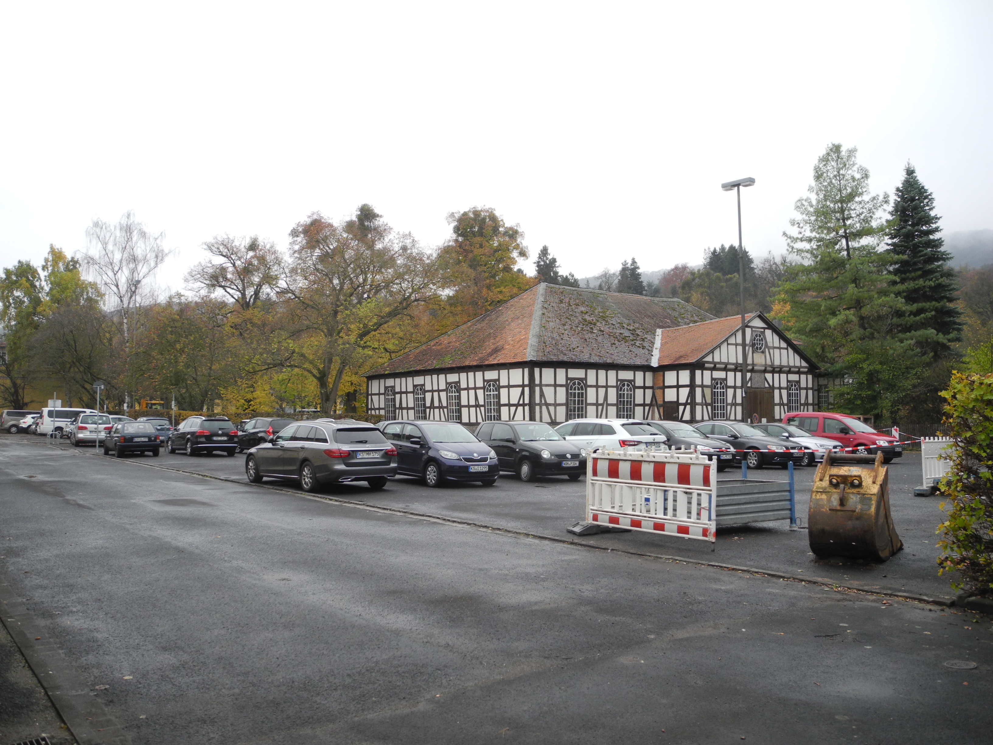 Die historische Reithalle ist ein Fachwerkgebäude im Ökonomiebereich des Bergpark Wilhelmshöhe in Kassel, Hessen, Deutschland. An ihrer Nord- und Ostseite ist die Halle gegenwärtig durch einen aphaltierten Parkplatz eingefasst und geprägt.